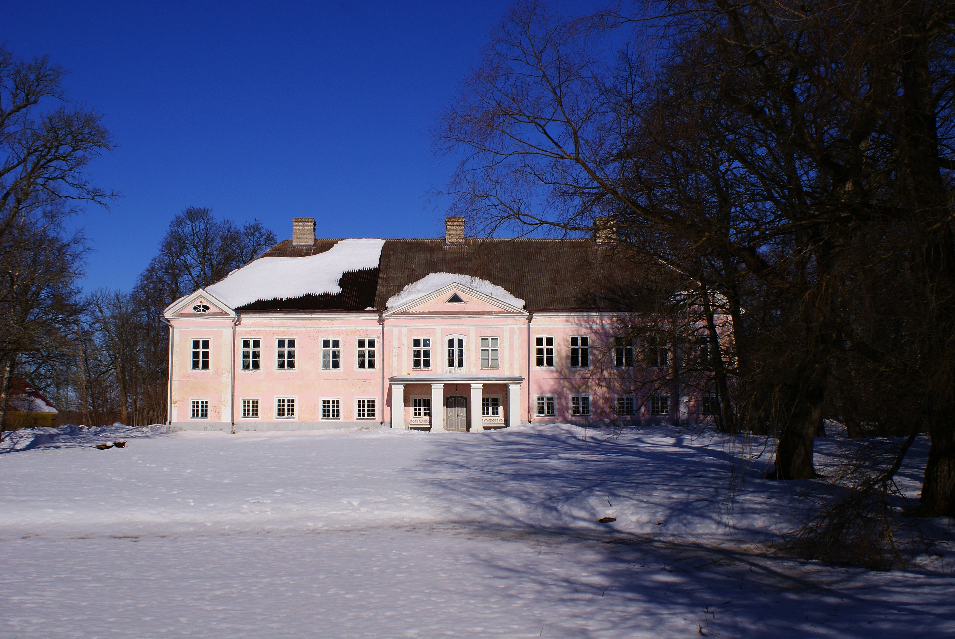 Suure-Lähtru mõisa peahoone